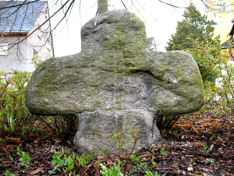 Sühnekreuz in Grüstädtel